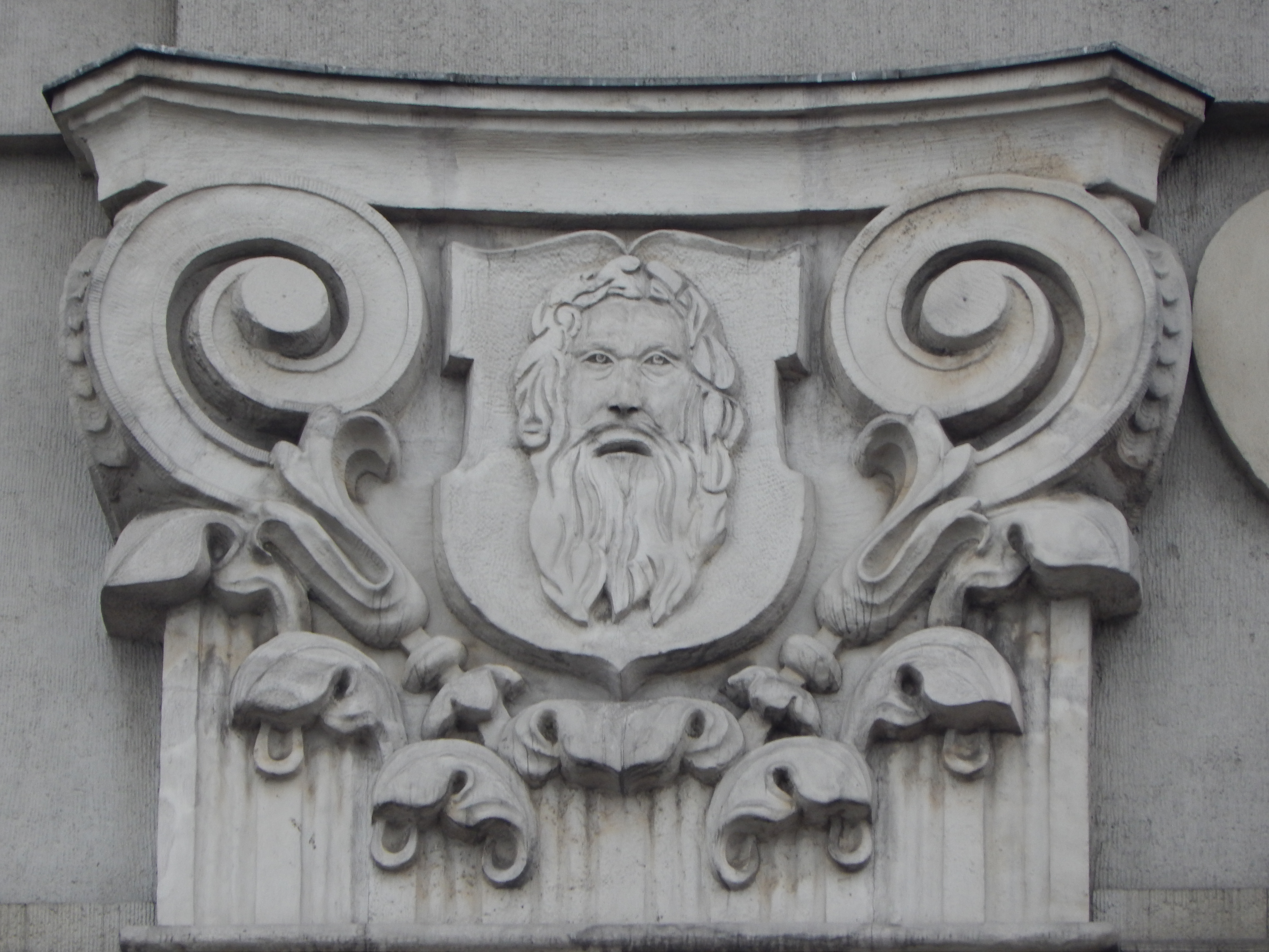 Fragment elewacji gmachu Sejmu Śląskiego - herb Mysłowic